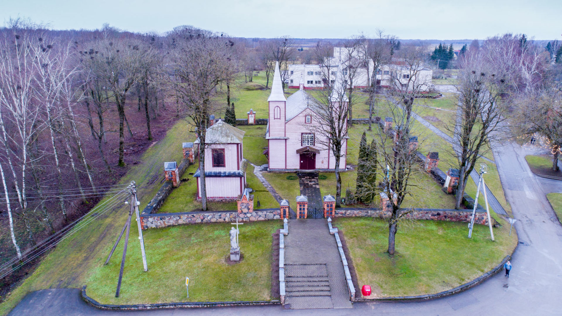 Alizavos bažnyčia